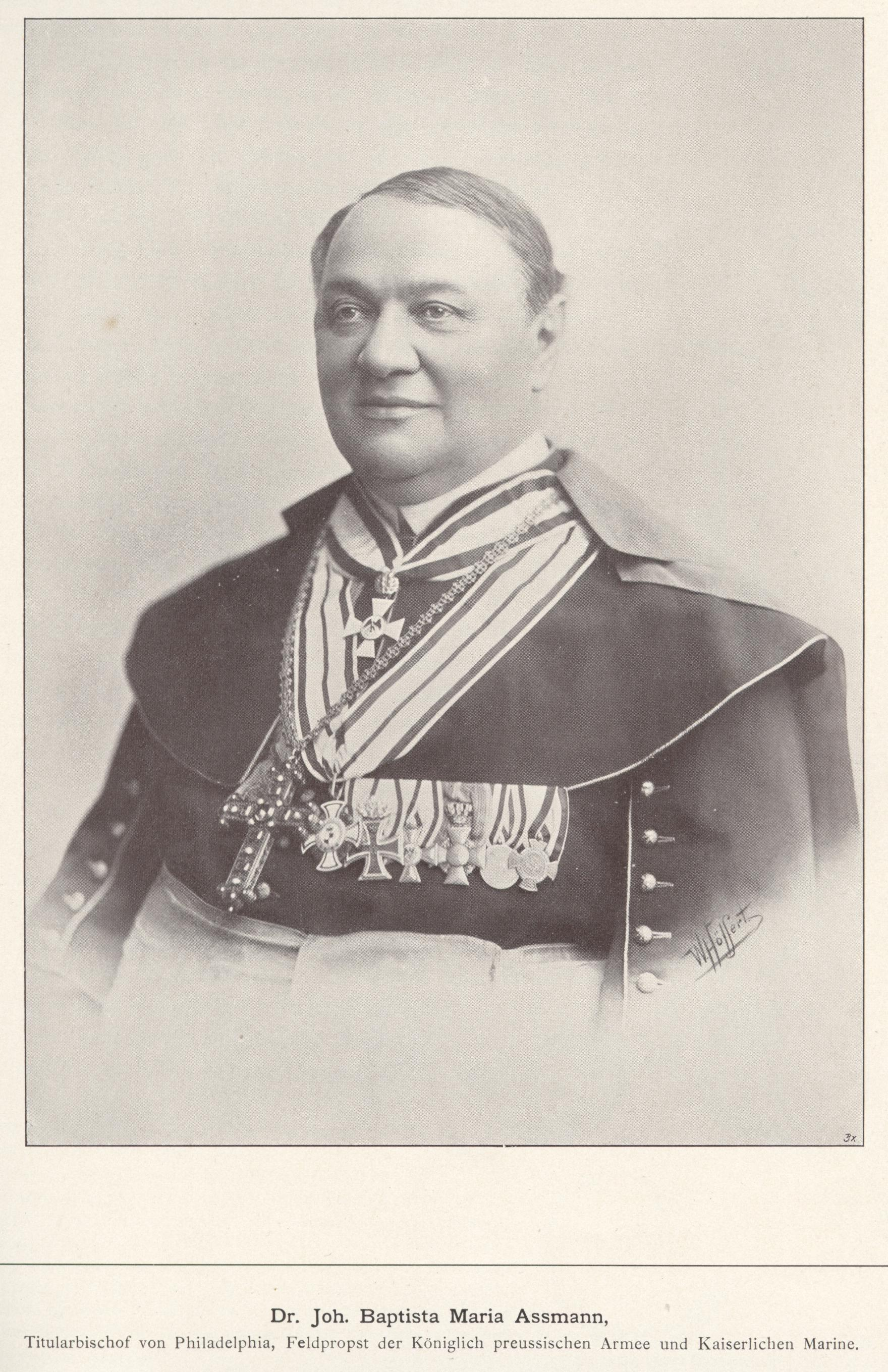 Johannes Maria Assmann, Preussischer Militärbischof (Feldpropst)